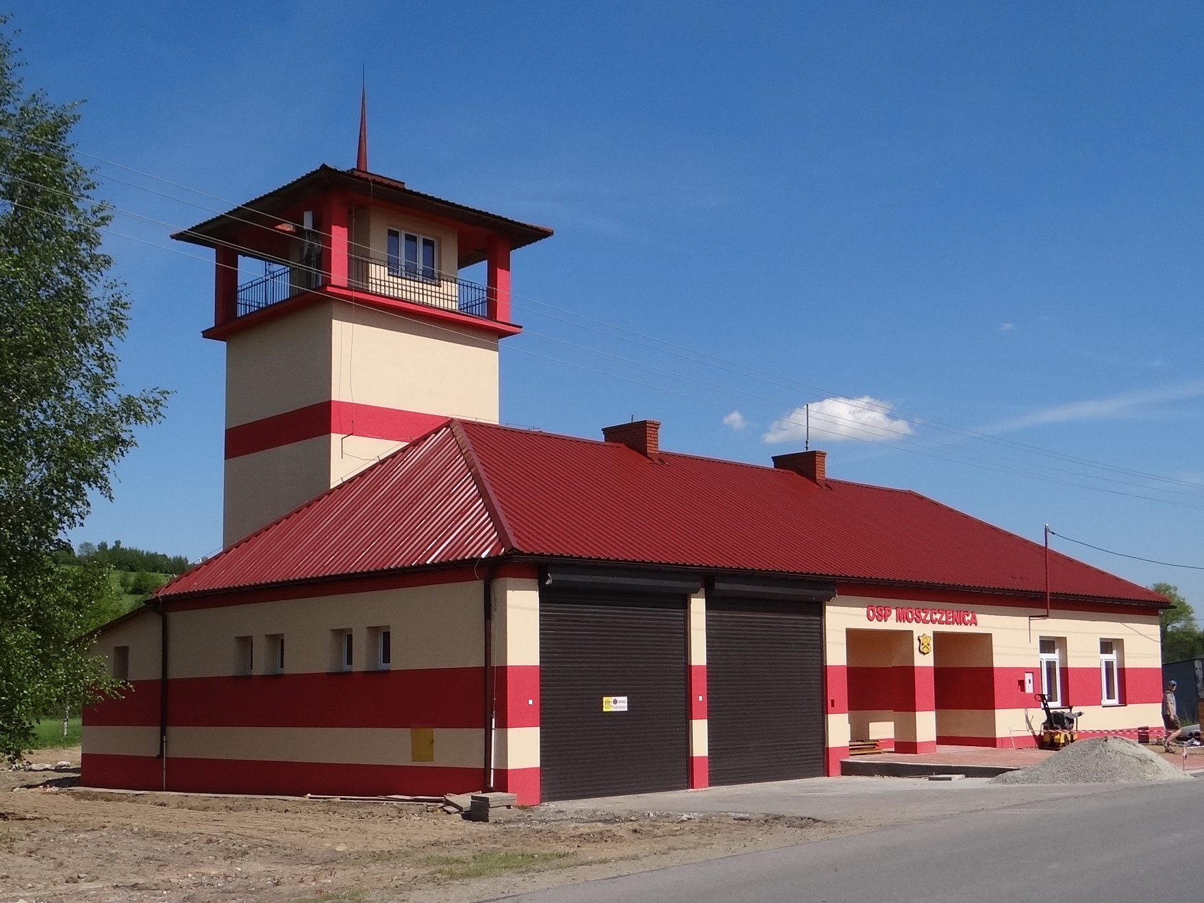 Remiza OSP w Moszczenicy